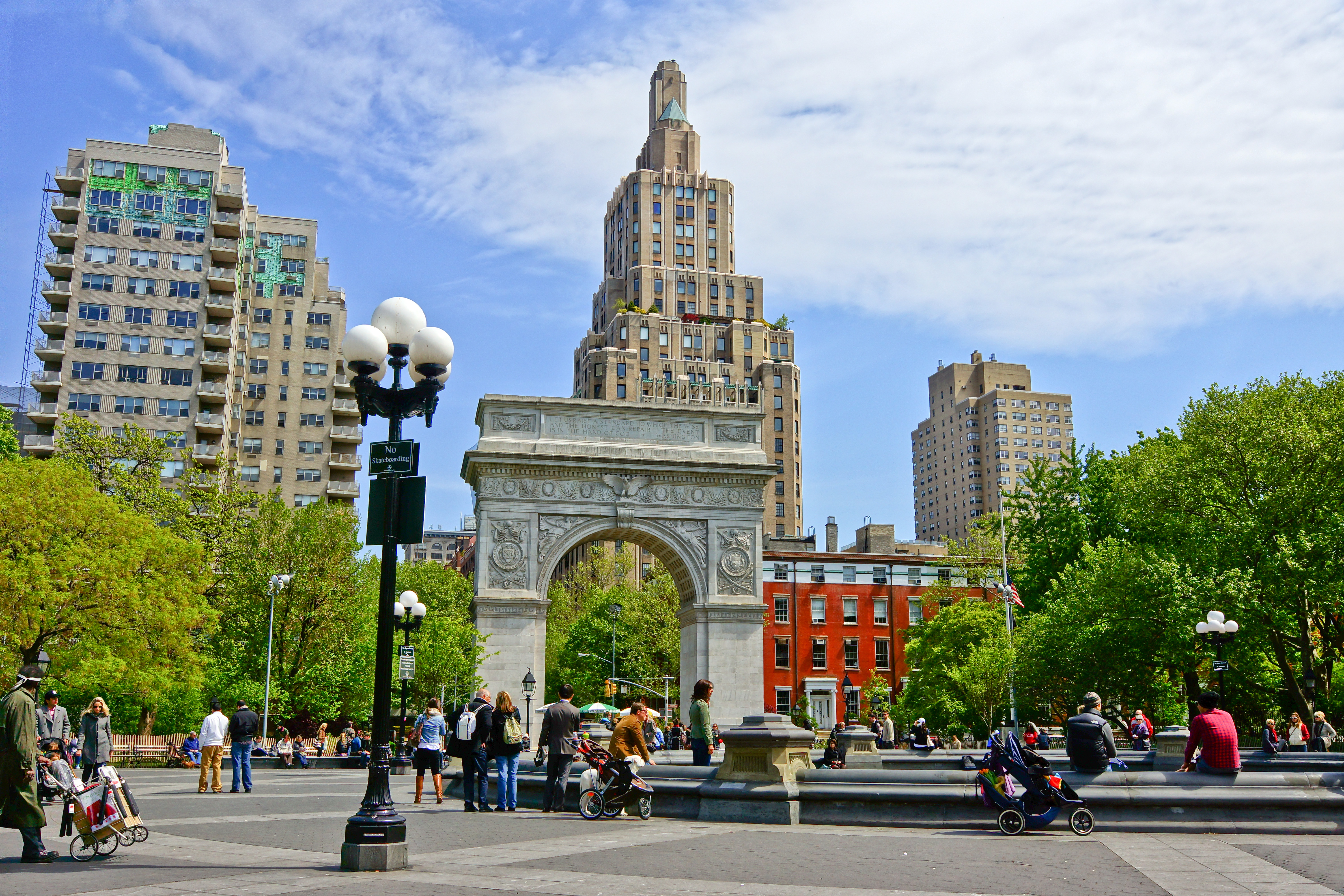 NYC - Washington Square